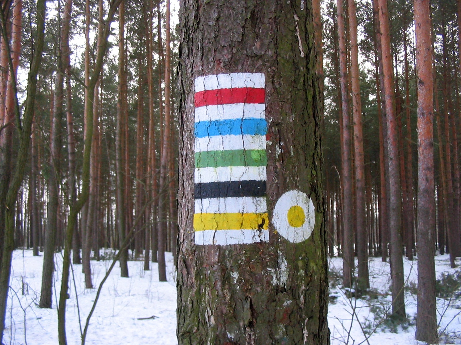 Symbole szlaków turystycznych przecinających się na Górze Wilkanowskiej w Zielonej Górze Autor: Mohylek 16:15, 28 March 2007 (UTC)